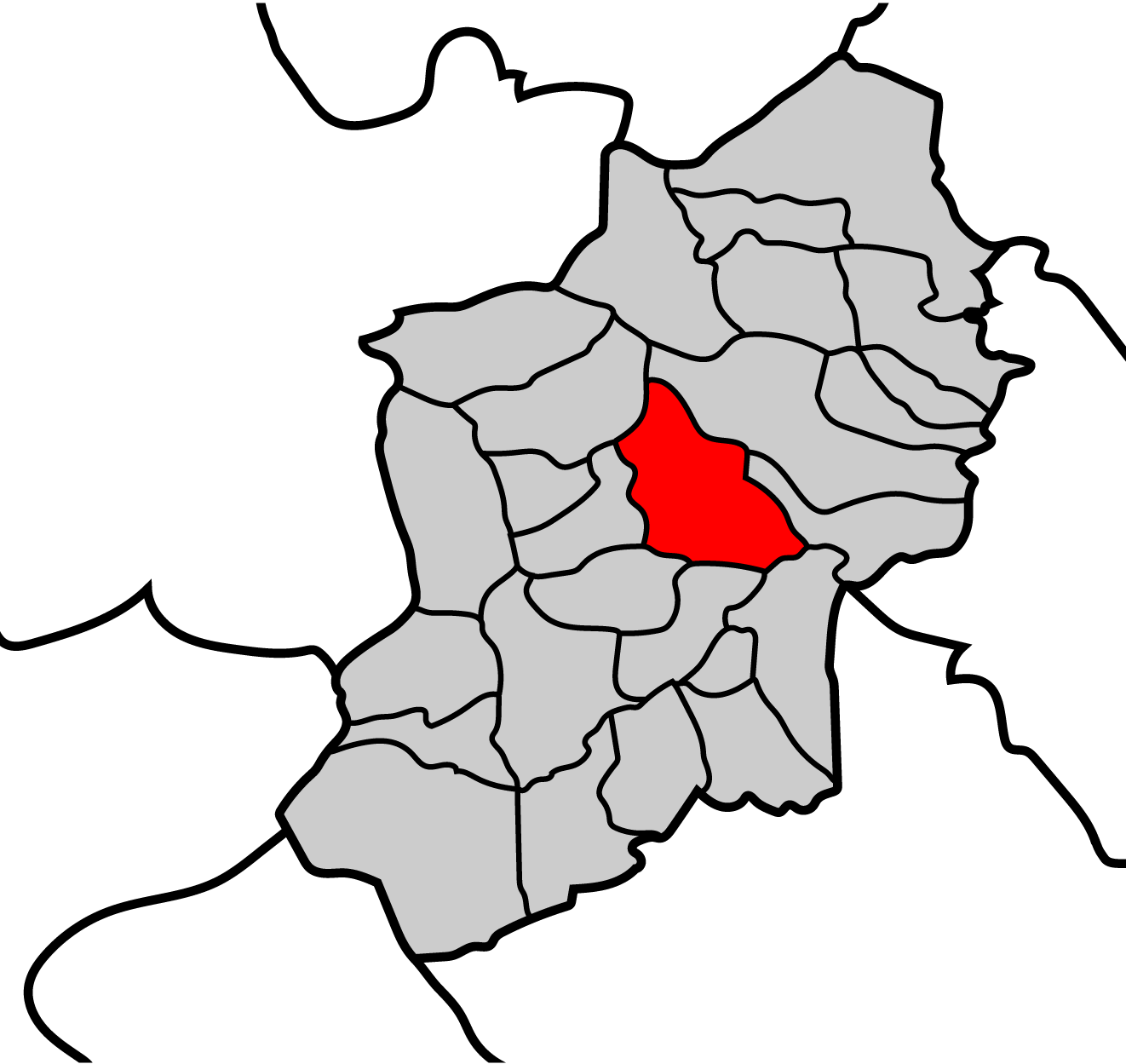 Mapa de la parroquia de Ouselle ayuntamiento de Becerreá